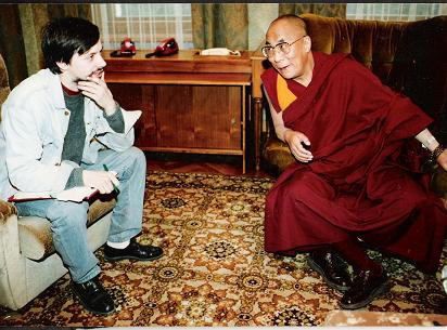 Писатель Олег Шишкин с Его Святейшеством Далай-ламой XIV, весна 1993 года, Кольчуга, Рублевское шоссе.